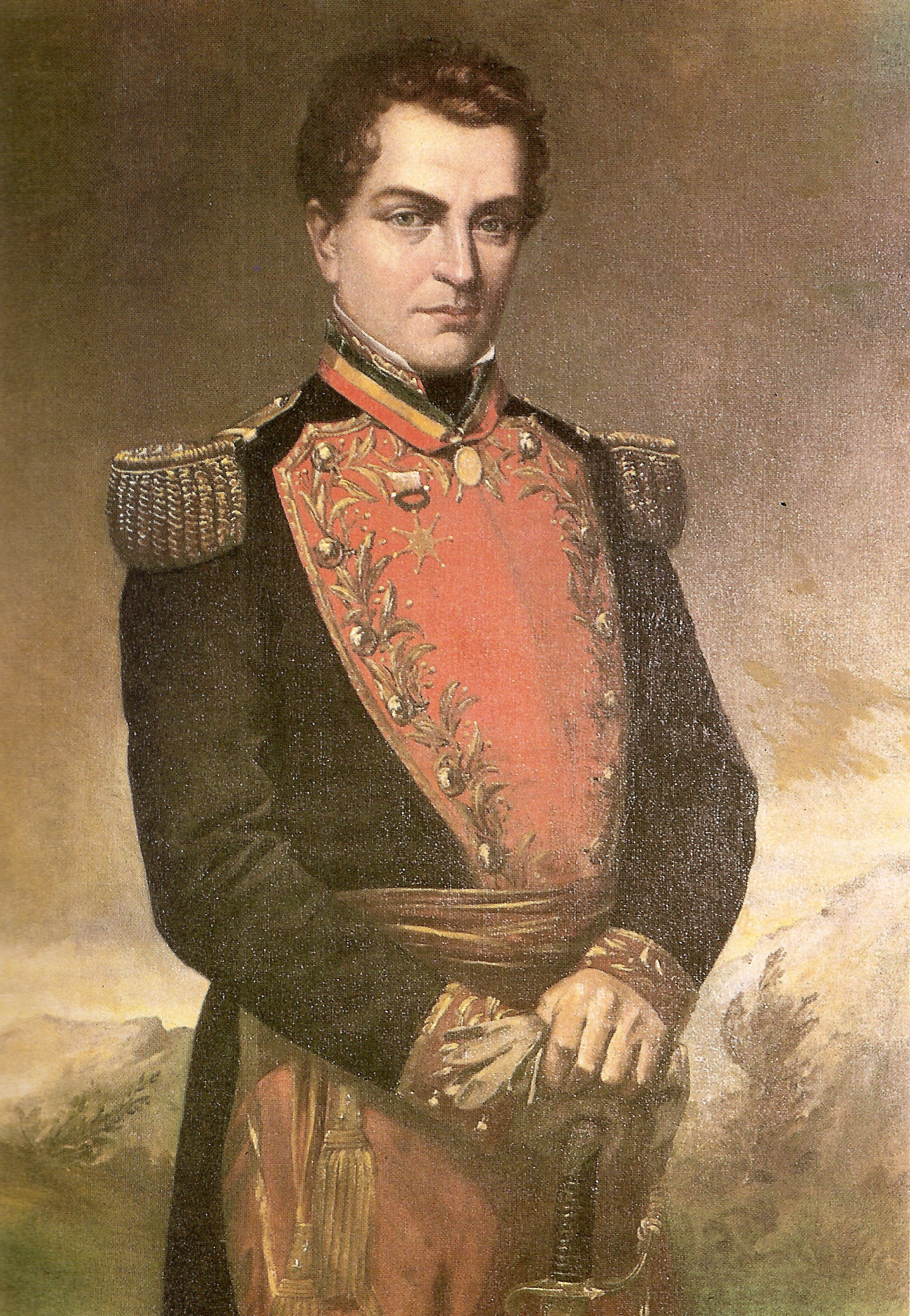 Martin Tovar y Tovar. Retrato de santiago Mariño. 1878. Oleo sobre tela. colecion John Boulton.